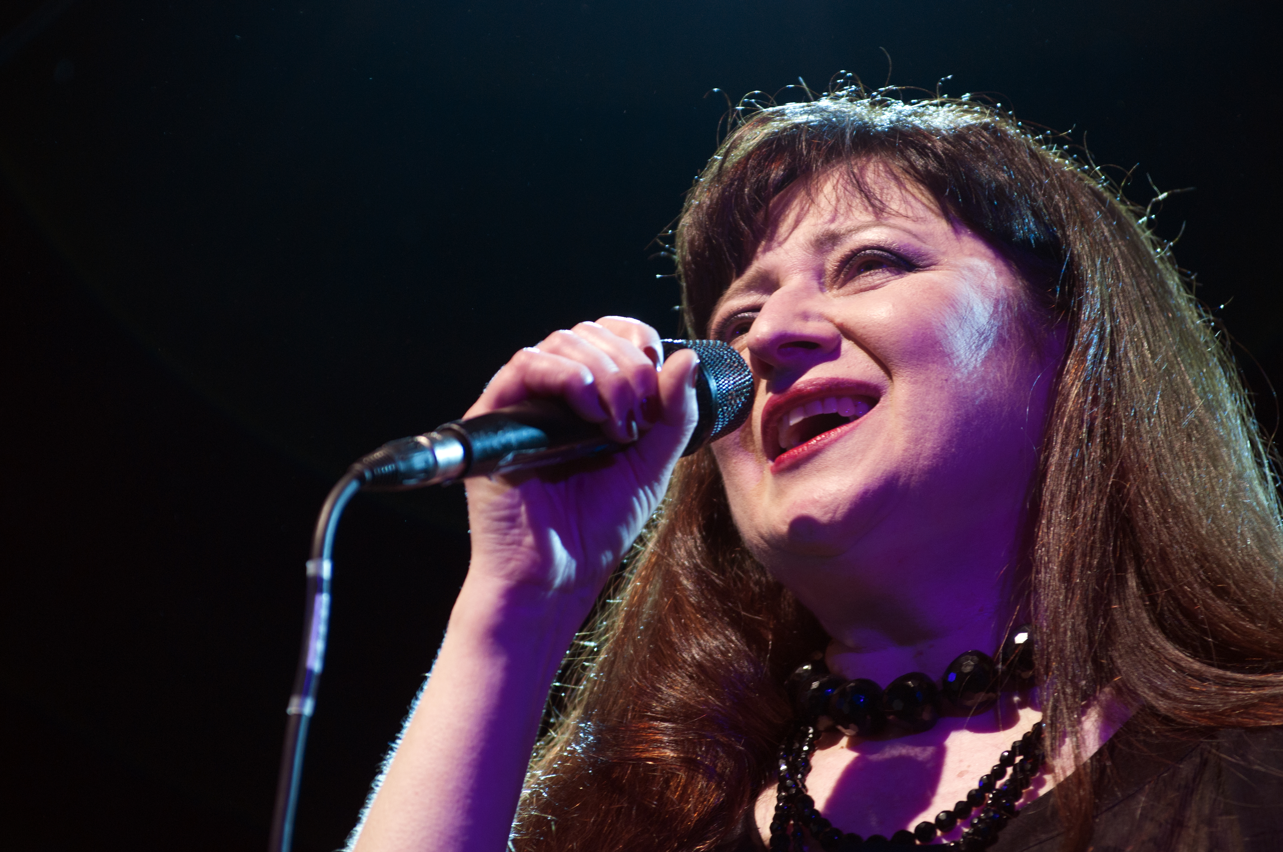 Basia Trzetrzelewska in Danzig bei der Eröffnung der Kirche des heiligen Jan am 24.06.2011